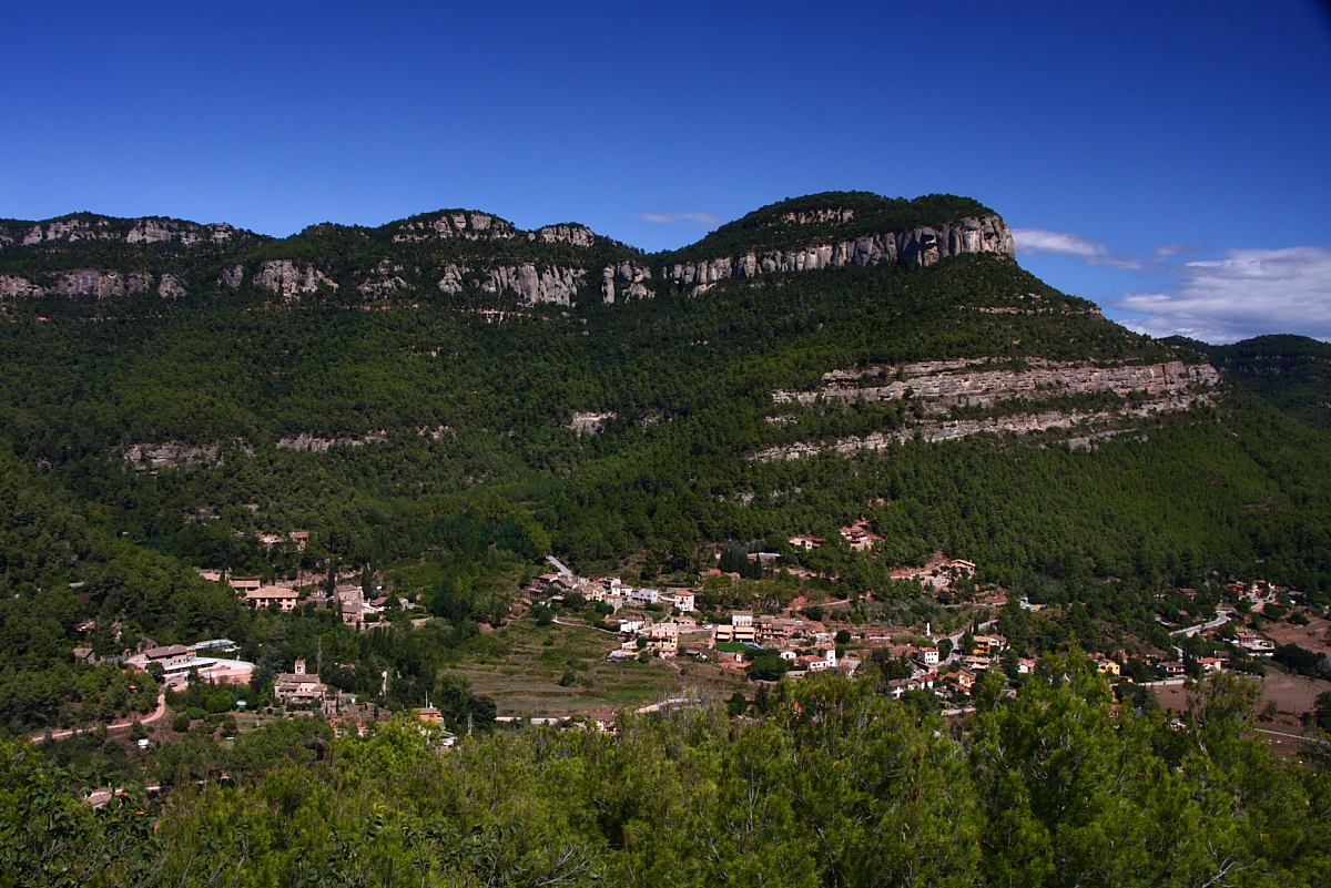 Gallifa amb el cingles darrera.Vallès Occidental (Catalunya).